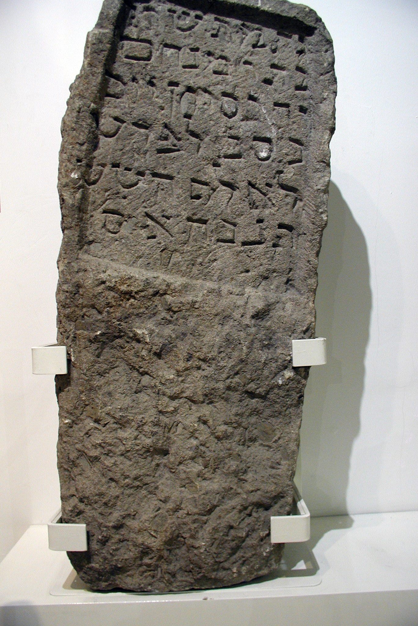 Köln, Grabstein der Jüdin Rachel des Jahres 1323 (städtisches Zeughaus-Museum Köln). Bei Grabungen im Kölner Rathausbezirk wurden 1953 zwei vollständig erhaltene Grabsteine an der Nordwestecke des Rathauses in einem großen Bombentrichter gefunden. Wahrscheinlich standen die Grabsteine auf dem ehemaligen jüdischen Friedhof vor dem Severinstorburg und wurden als Baumaterial missbraucht. Inschrift: "Es starb Frau Rachel, Tochter des R. Schneior, am Dienstag, den 16. Elul des Jahres 83 des 6. Jahrtausends. Ihre Seele sei geknüpft in den Bund des ewigen Lebens. Amen. Sela."